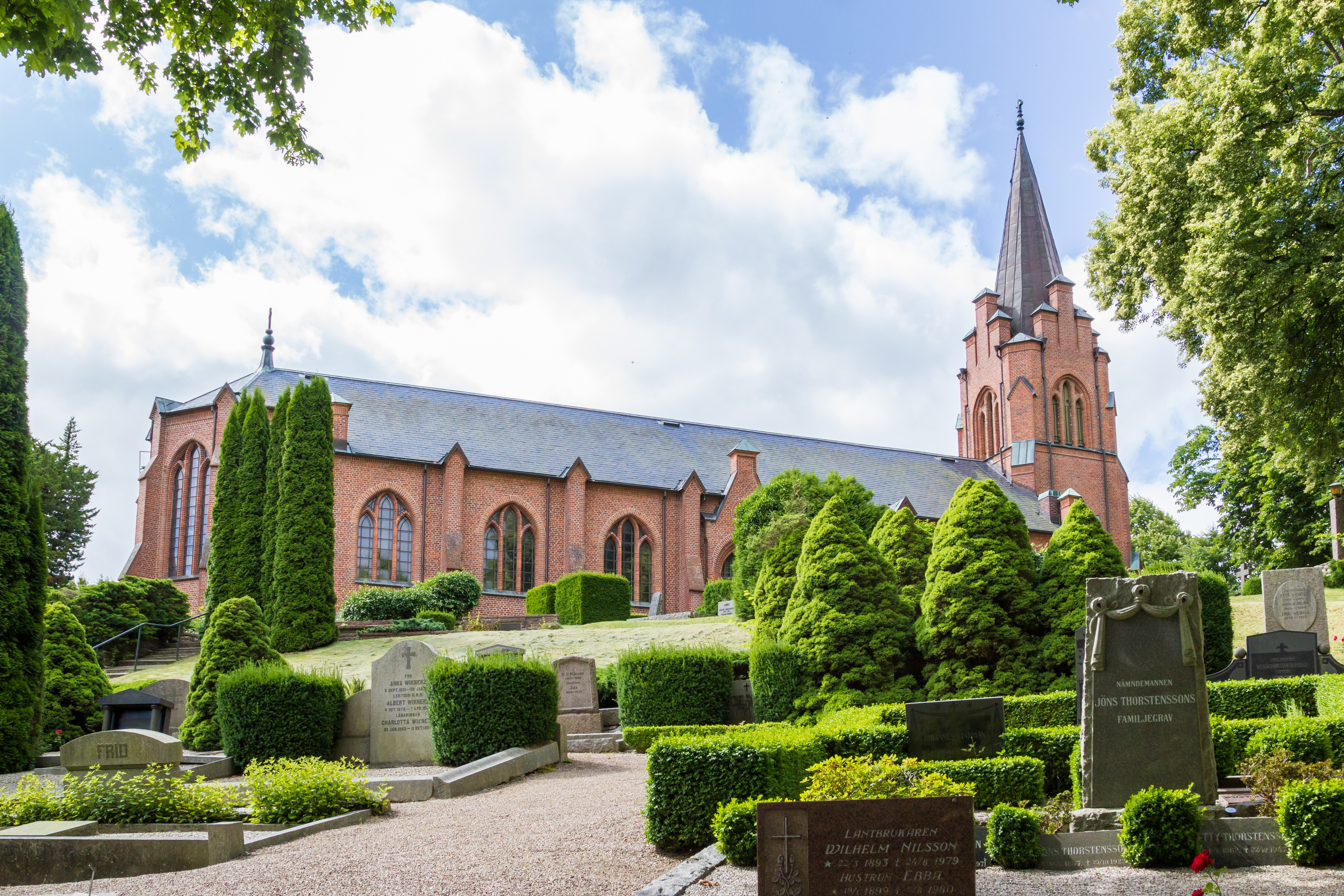 Billinge kyrka (Billinge 42:1)